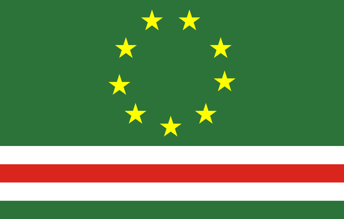 Флаг Общенационального Конгресса Чеченского Народа (ОКЧН).